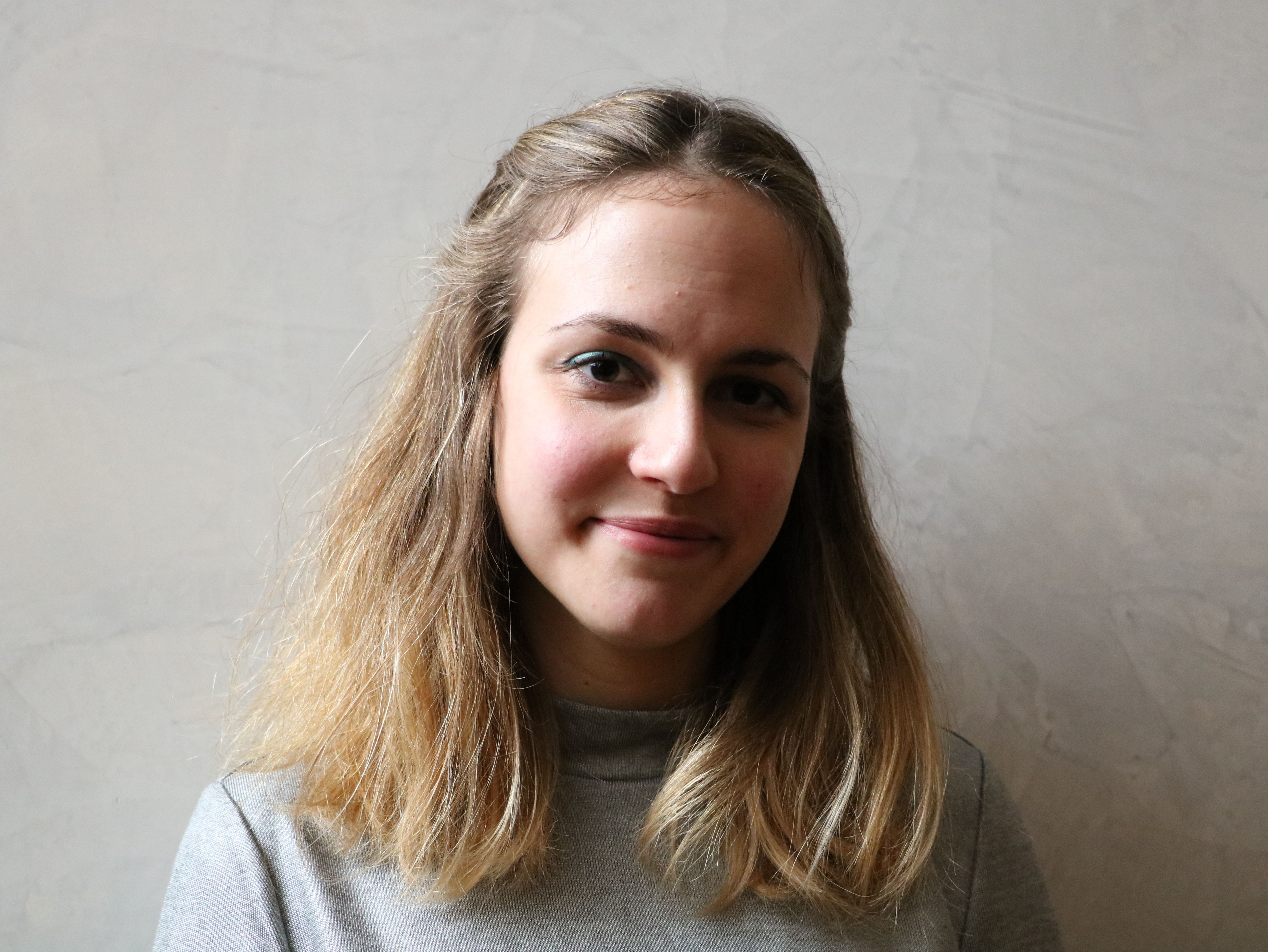 Sanja Bizjak, pianiste, concert en duo avec Lidija Bizjack, le 3 février 2017, Folle Journée, Nantes.